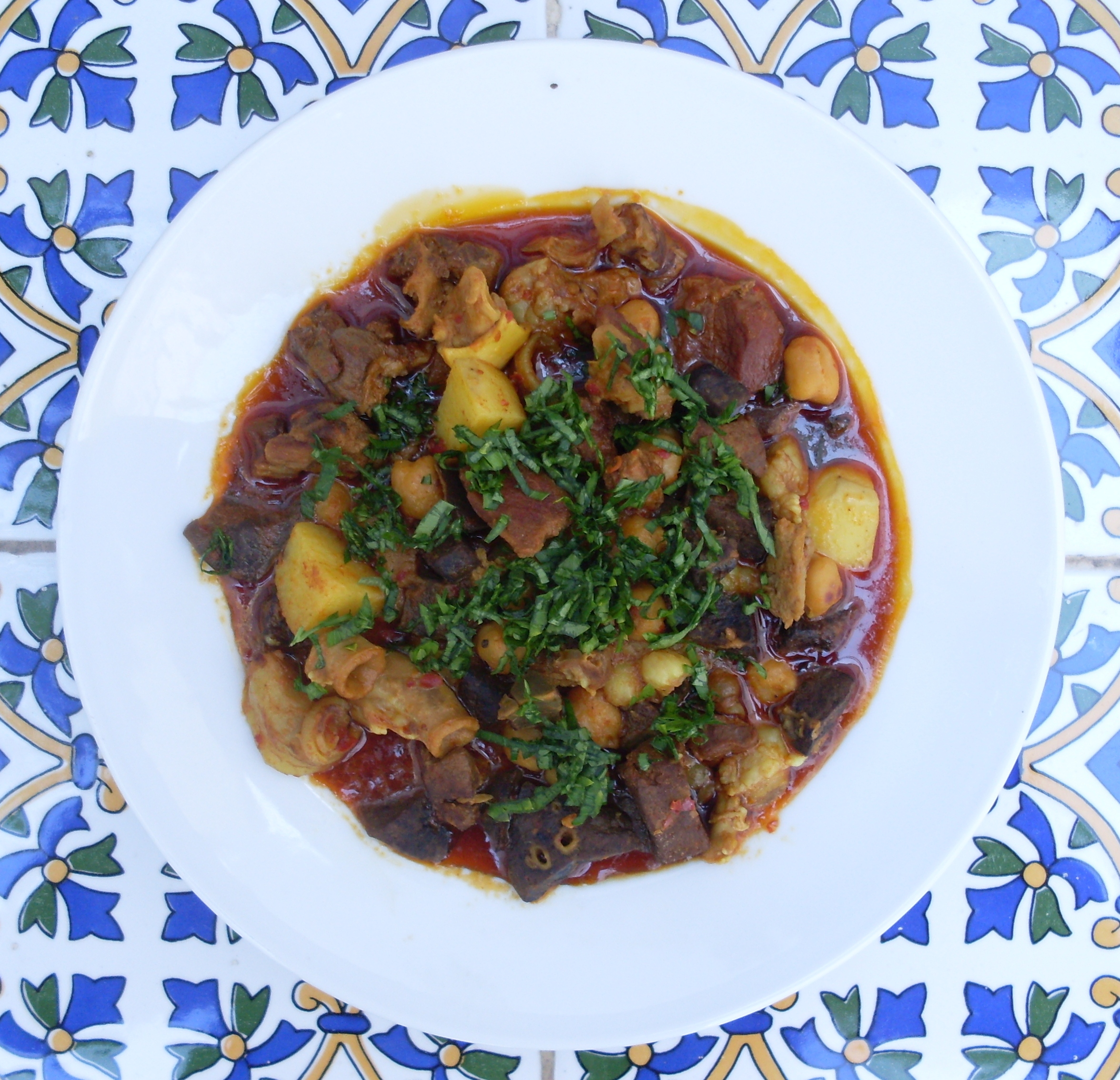 Plat Djerbien à base d'abats préparé à l'occasion de l'Aïd